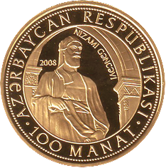 Nizami Gəncəvinin xatirəsinə həsr olunmuş qızıl sikkə